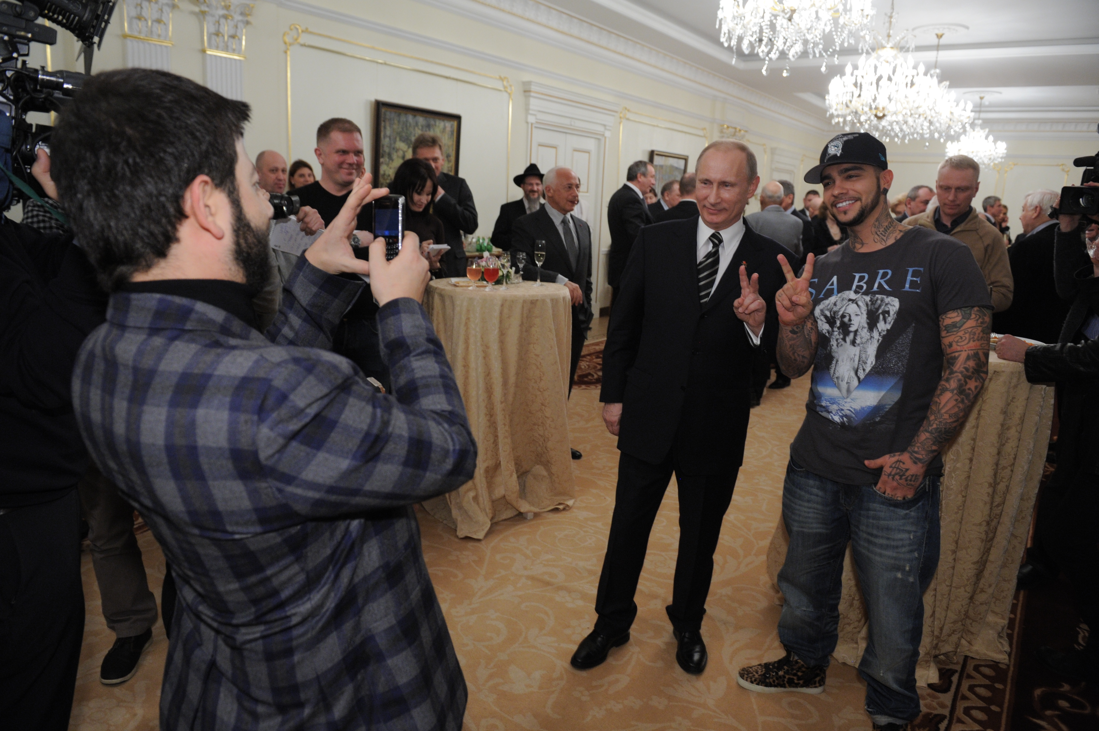 Владимир Путин с Тимуром Юнусовым (Тимати)